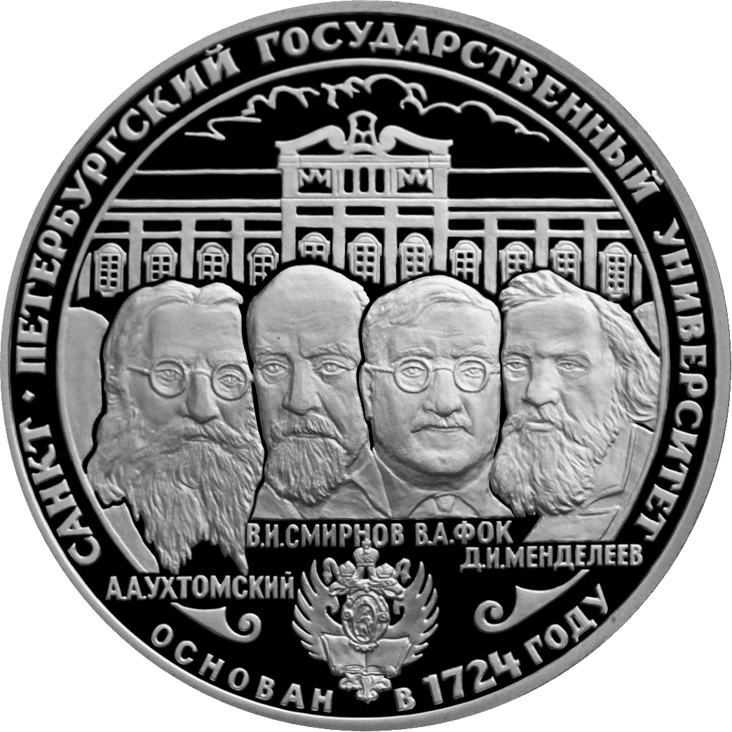 Монета Банка России — Серия: «Наука», 275-летие первого Российского университета, 3 рубля, реверс